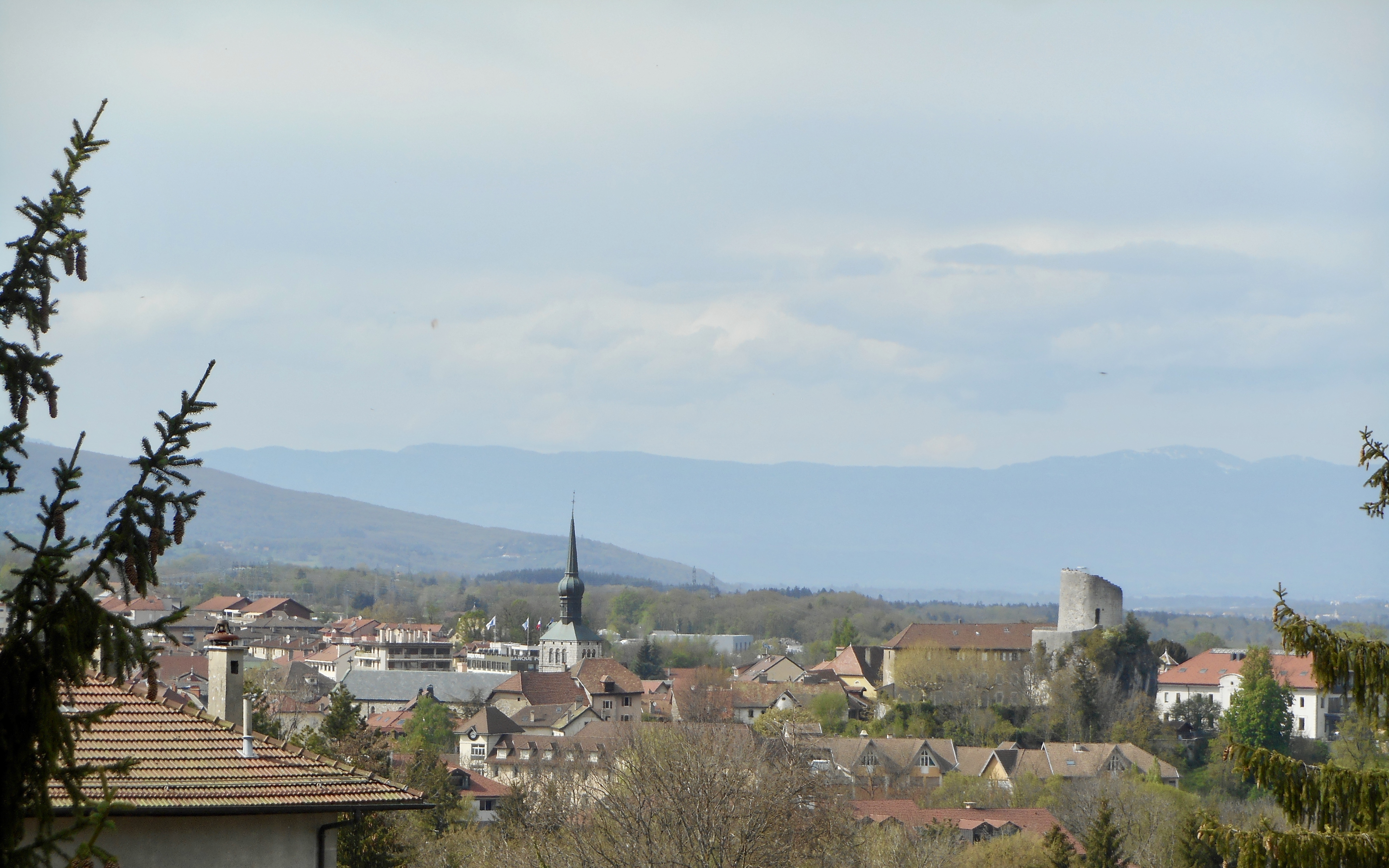 Vue sur la ville médiévale, avec le donjon et l'église, de La Roche-sur-Foron, depuis la Bénite Fontaine, printemps 2019.